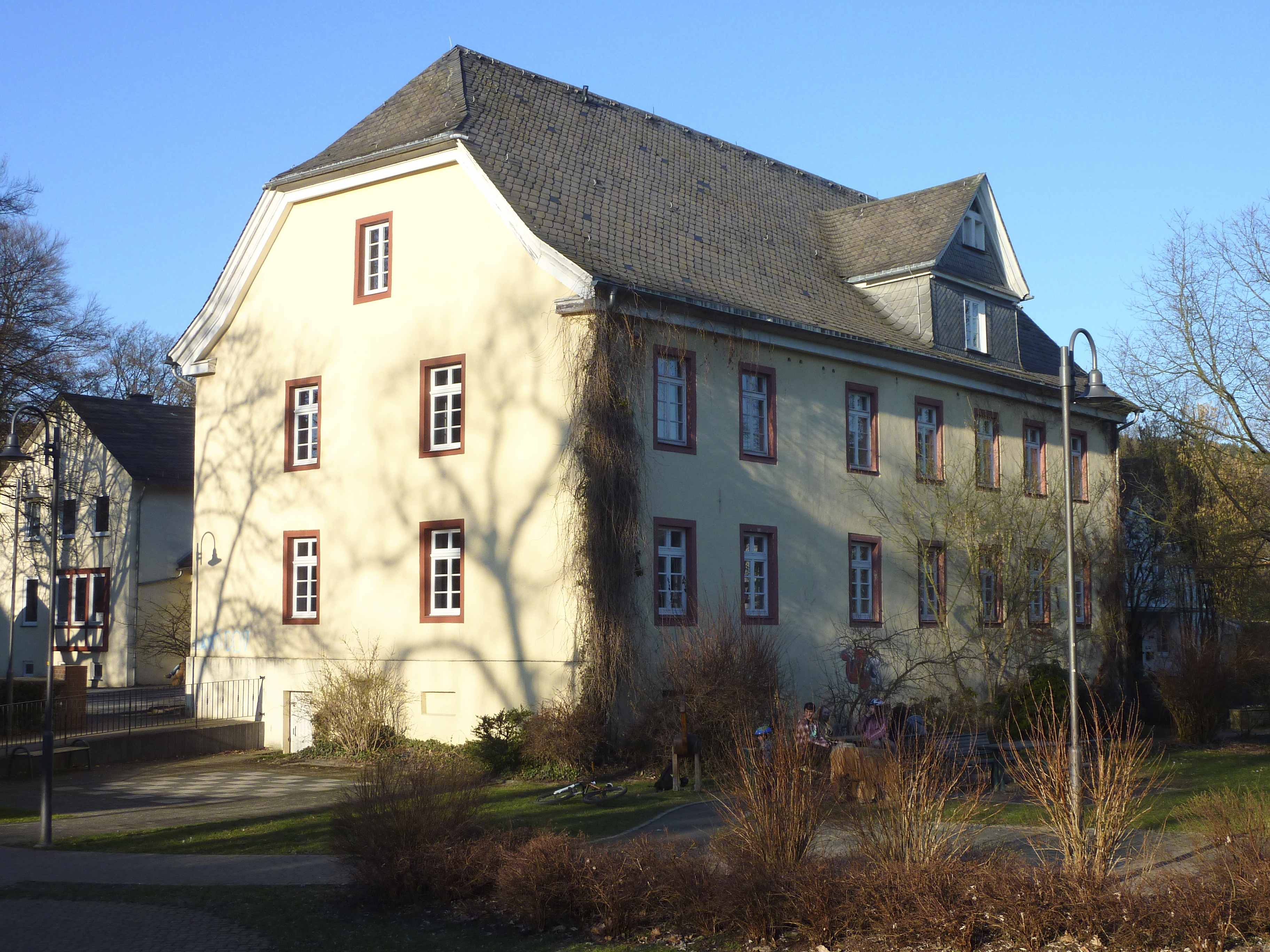 Stadt Hilchenbach im Kreis Siegen-Wittgenstein, Nordrhein-Westfalen, Bundesrepublik Deutschland: die Wilhelmsburg, 1365 erstmal urkundlich erwähnter Burgstandort; heutiges Hauptgebäude von 1767. Heute Sitz von Stadtmuseum, Stadtarchiv und Stadtbücherei